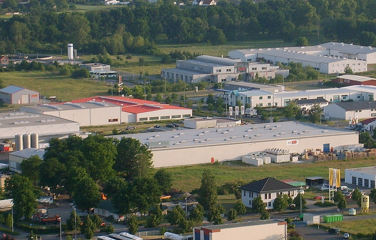 Gewerbegebiet-Ost in Elsterwerda.